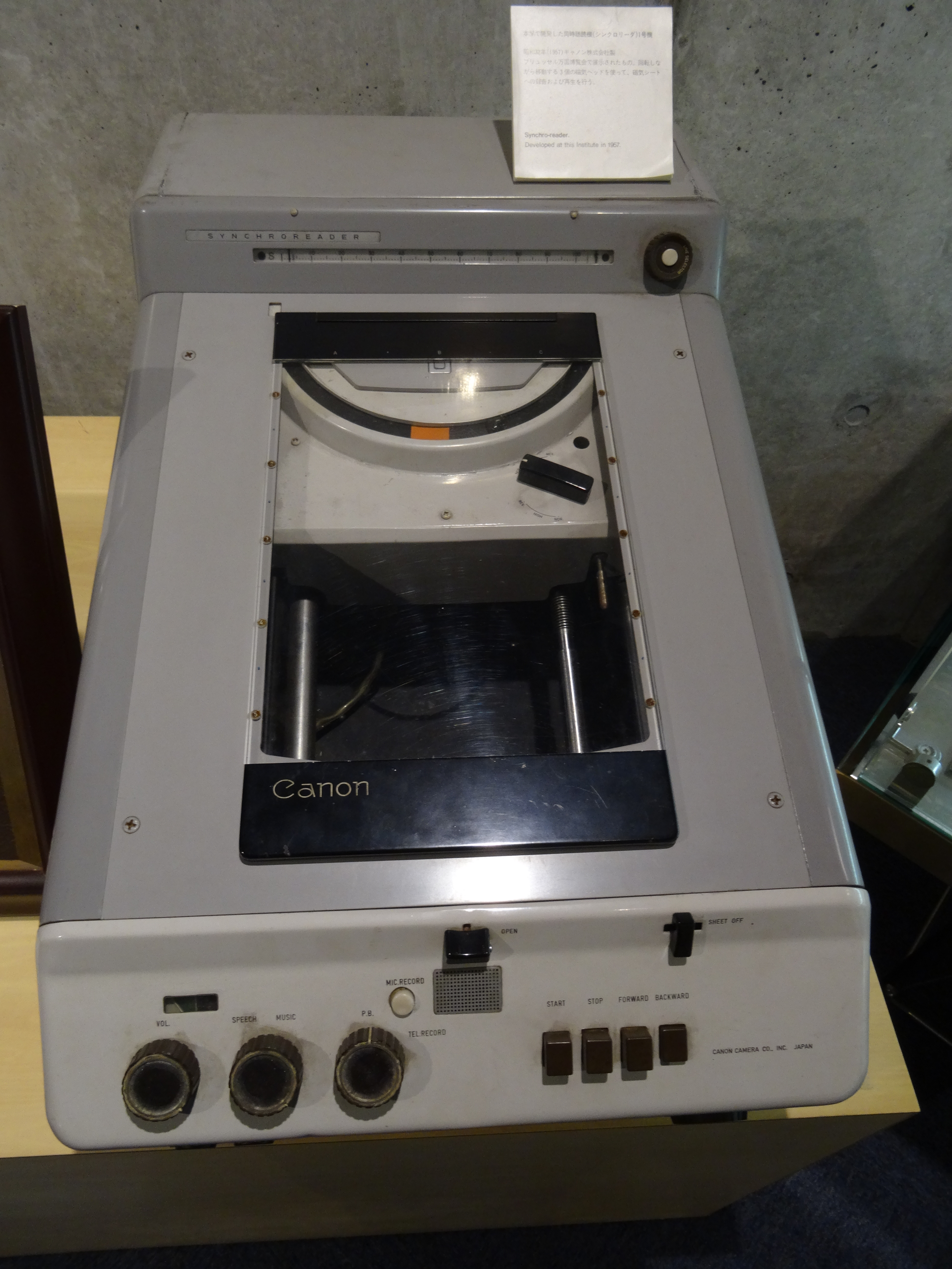 東京工業大学において開発された同時聴読機（シンクロリーダー）。ブリュッセル万国博覧会_で展示されたもの。1957年、キヤノン製。東京工業大学博物館所蔵。